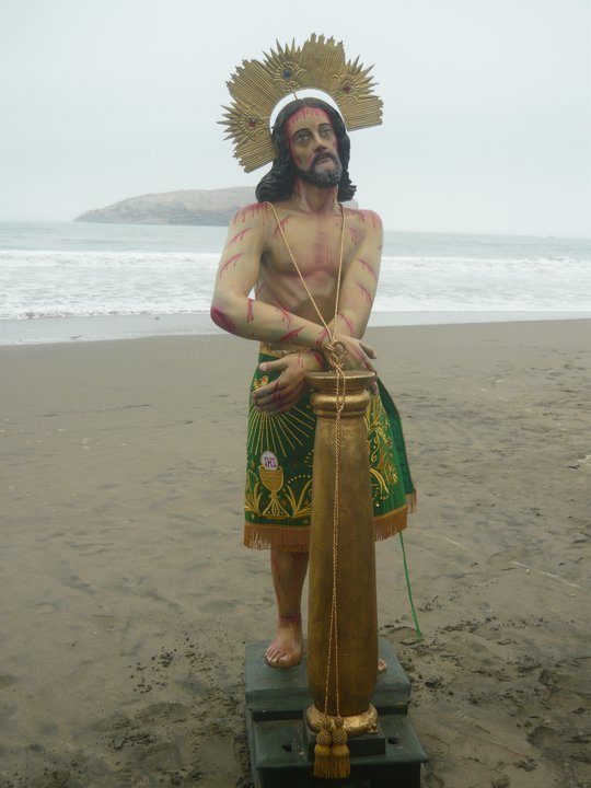 Columna